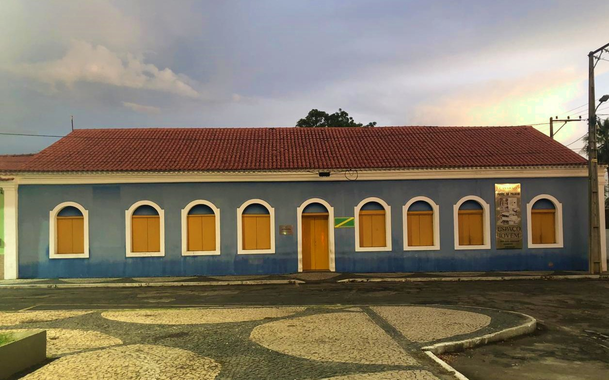 Histórica edificação da intendência de Piracuruca construída nos 1820s.